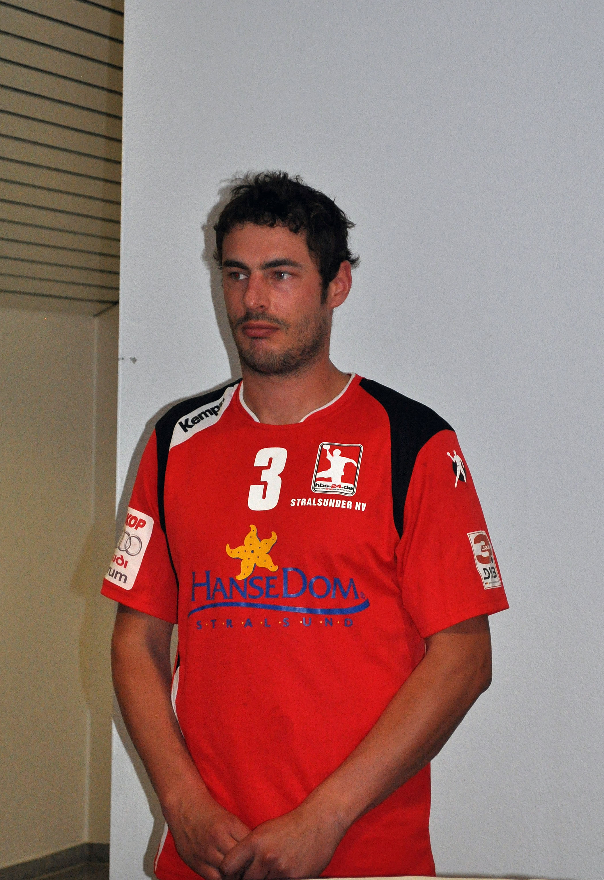 Torben Ehlers vom Stralsunder HV nach dem Punktspiel gegen den VfL Fredenbeck in der Stralsunder Vogelsanghalle beim Pressegespräch.